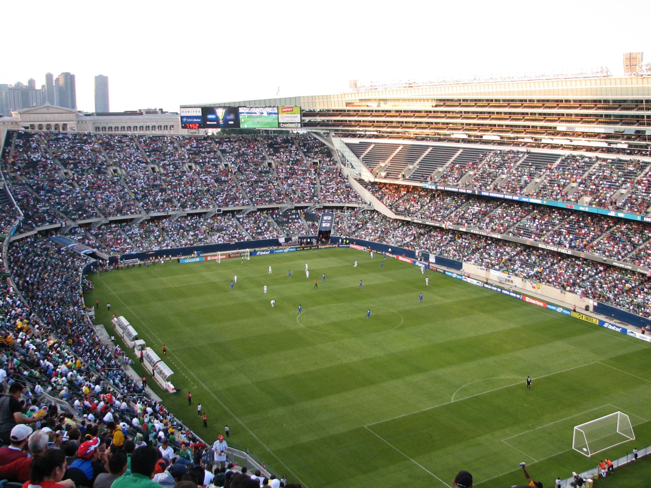 Vista general del Estadio Soldier Field de Chicago Illinois durante la semifinal de la Copa Oro 2009. El marcador favorece a Estados Unidos 2 a 0.